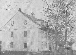 Premier Séminaire (1873-1875)